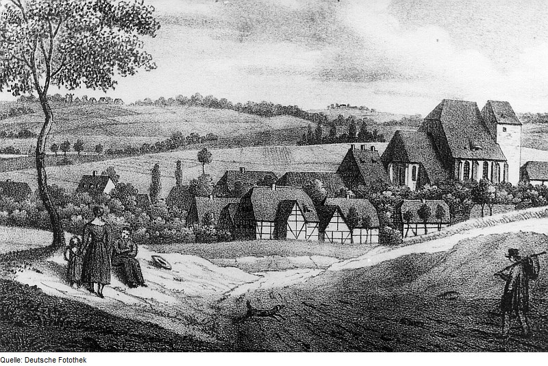 Original image description from the Deutsche Fotothek Mügeln. Stadtansicht